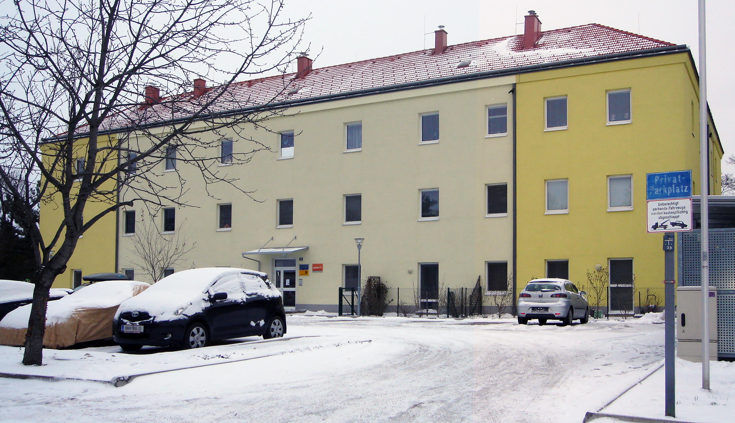 Trumau (Niederösterreich), Nelkengasse 8, ehemaliges, 1838/40 errichtetes Fabriksamt der bis 1928 bestehenden Baumwollspinnerei